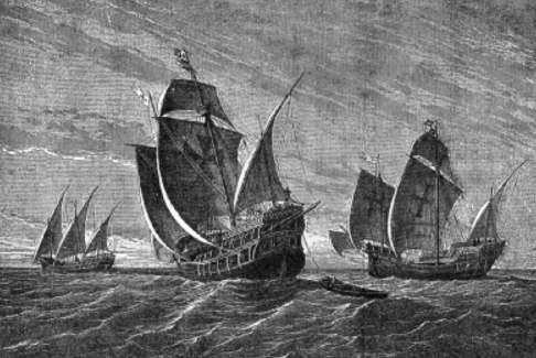 "Die Schiffe des Columbus", historisierde Darstellung aus dem späten 19. Jahrhundert